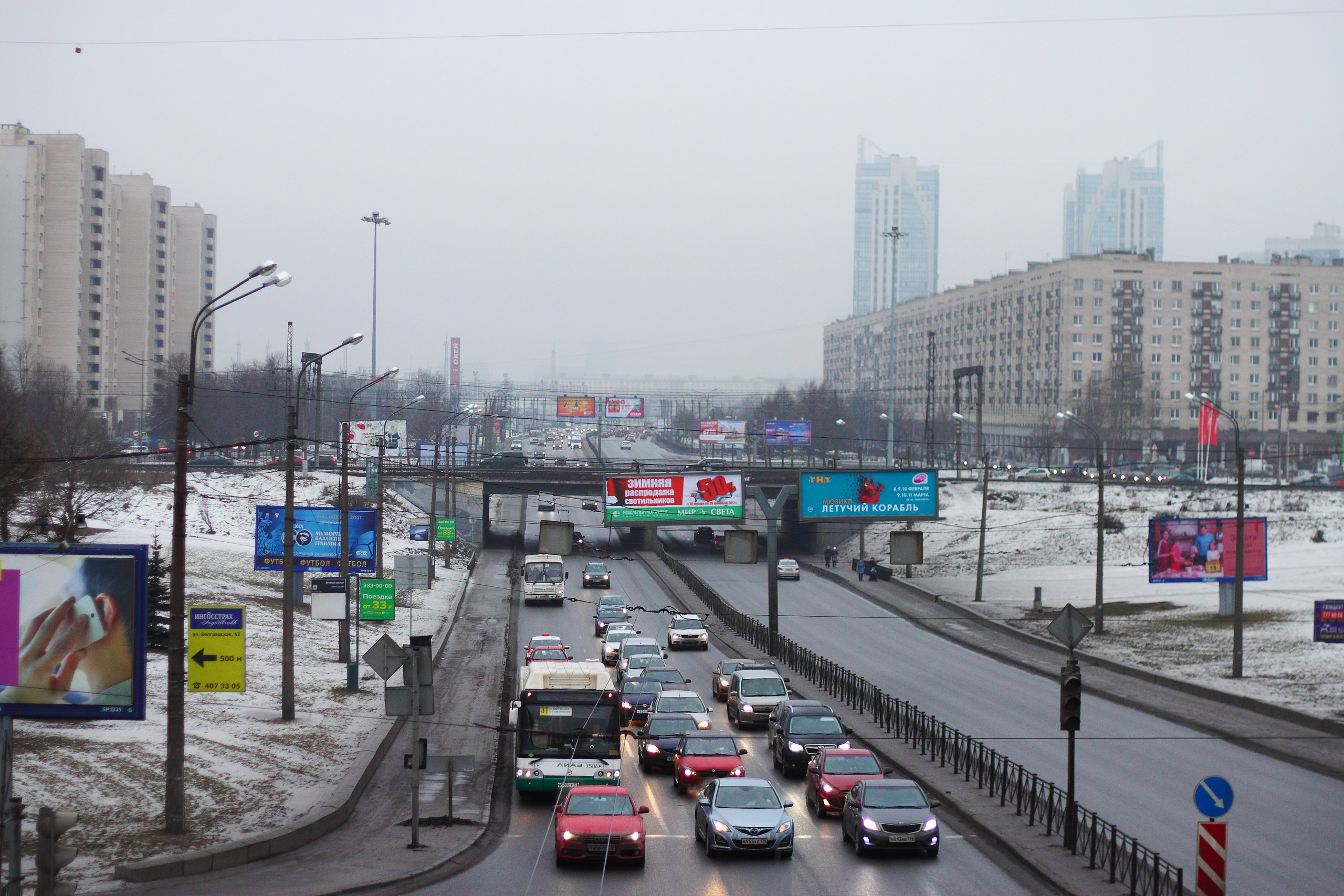 Проспект Славы при пересечении с Белградской улицей. Вид на Запад с высоты пешеходного перехода